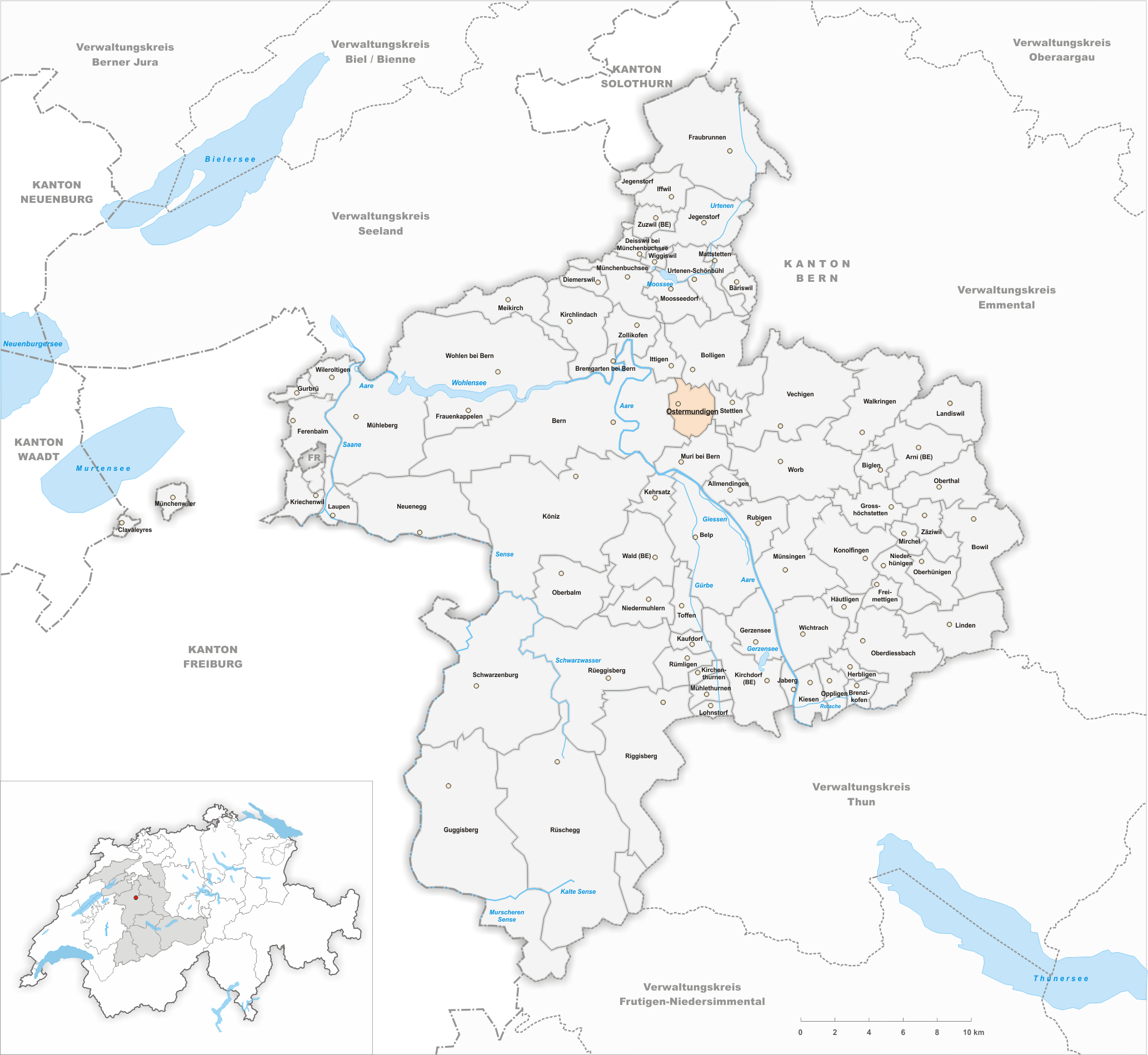 Municipality Ostermundigen